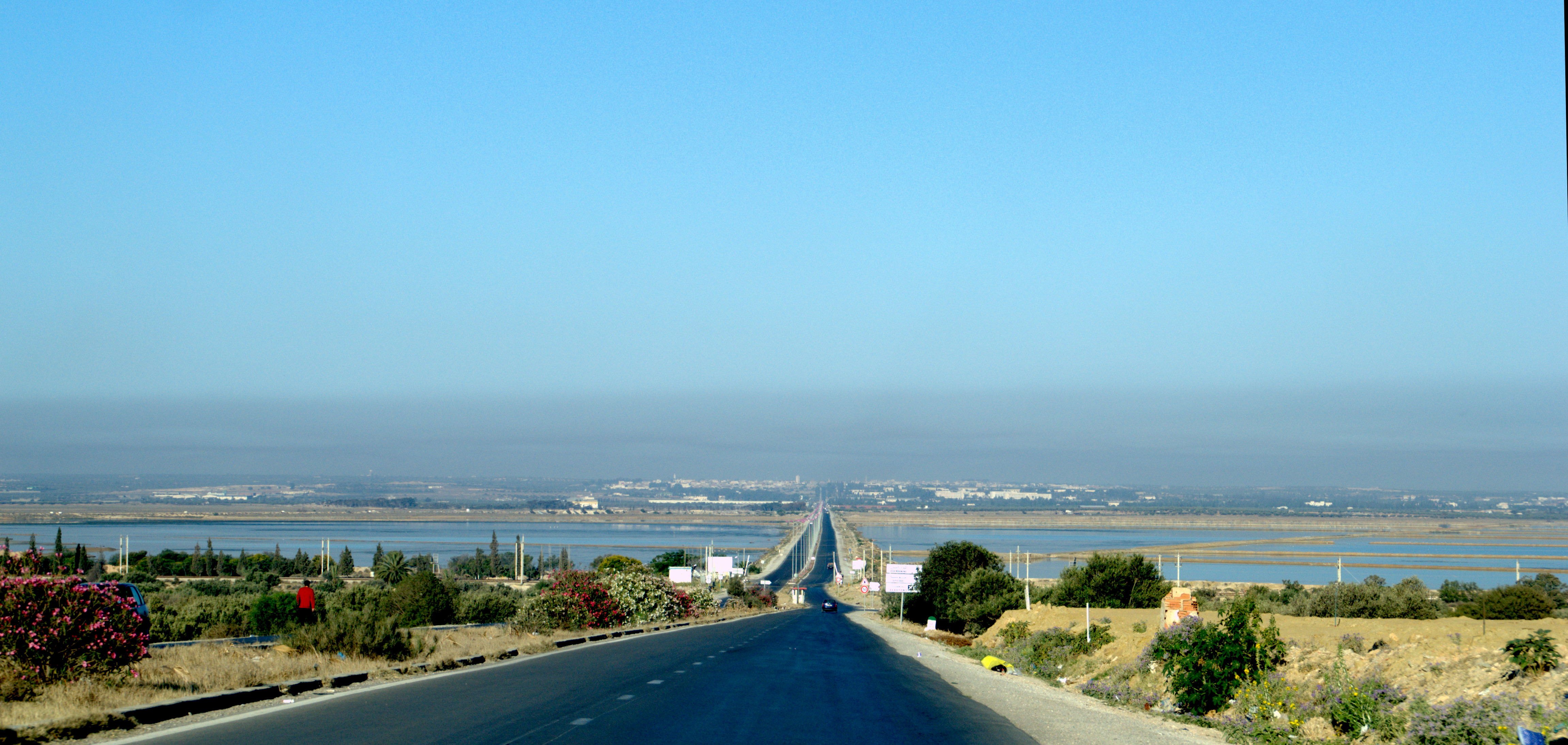 Route dans la sebkha de Monastir